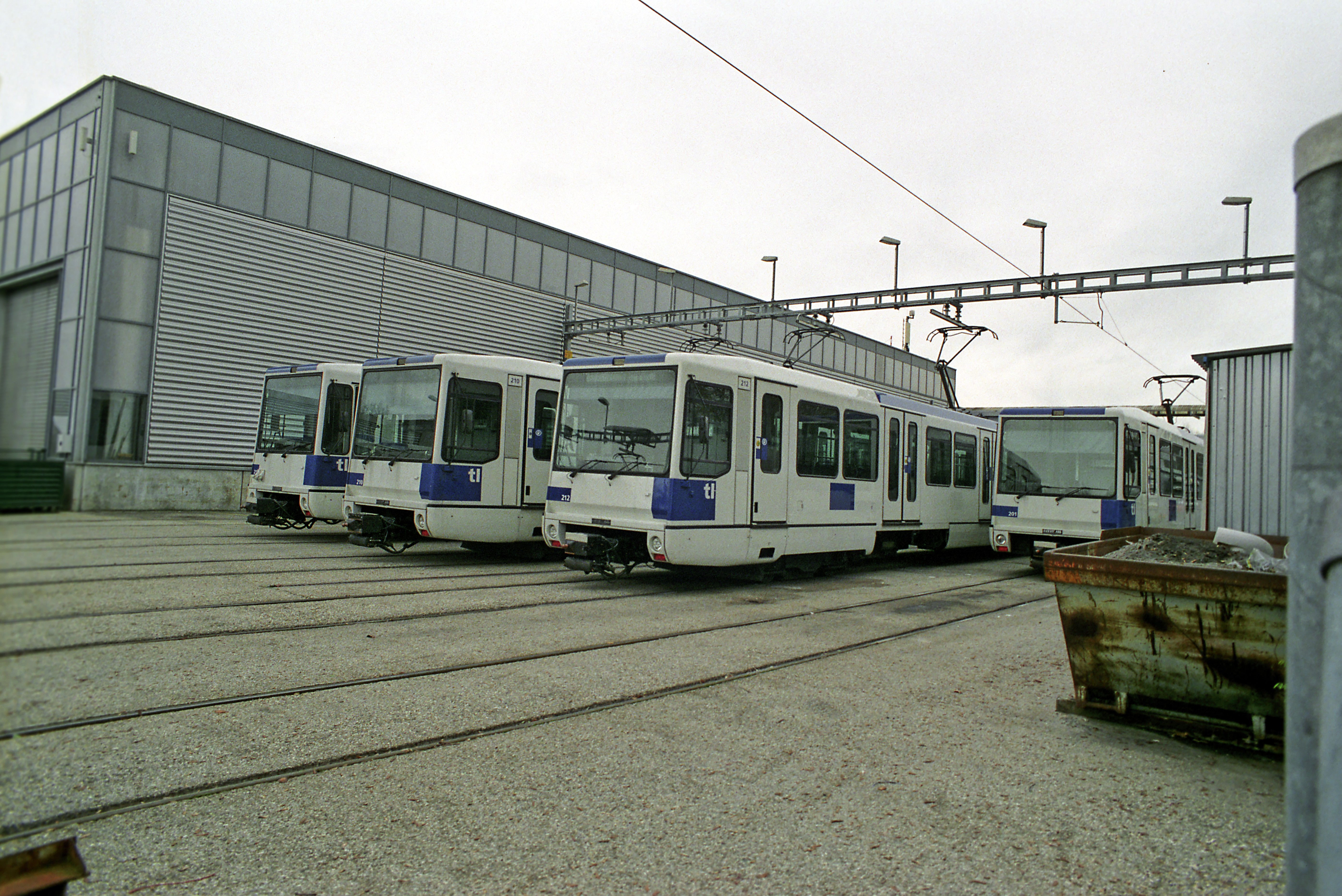 Nur die Abstellplätze der Wagen sind zum Aufnahmezeitpunkt mit einer Stromversorgung ausgerüstet, für Rangier- und Überführungsfahrten sind die Bem 4/6 mit einem Dieselhilfsantrieb ausgerüstet.